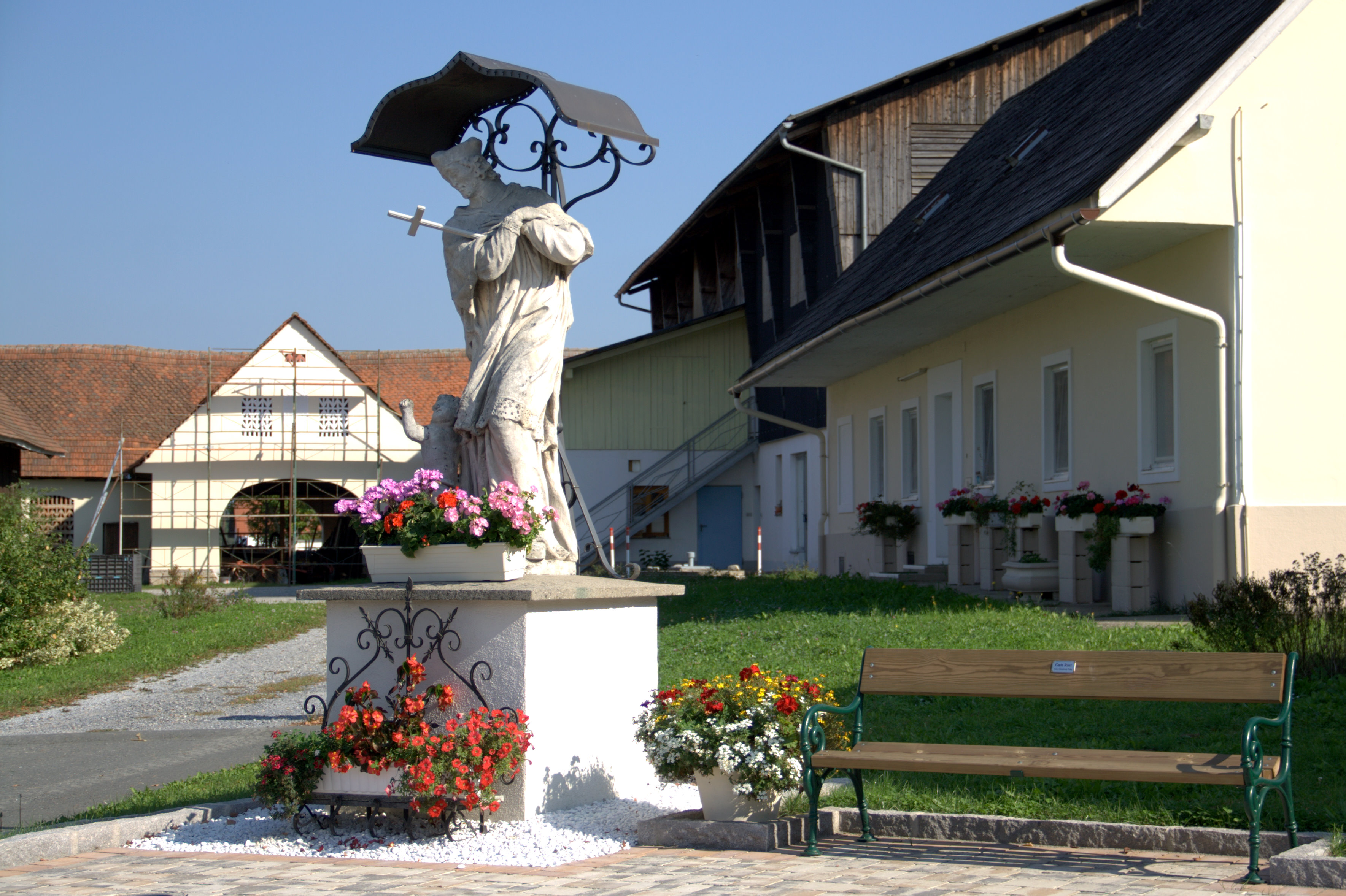 Figurenbildstock hl. Johannes Nepomuk